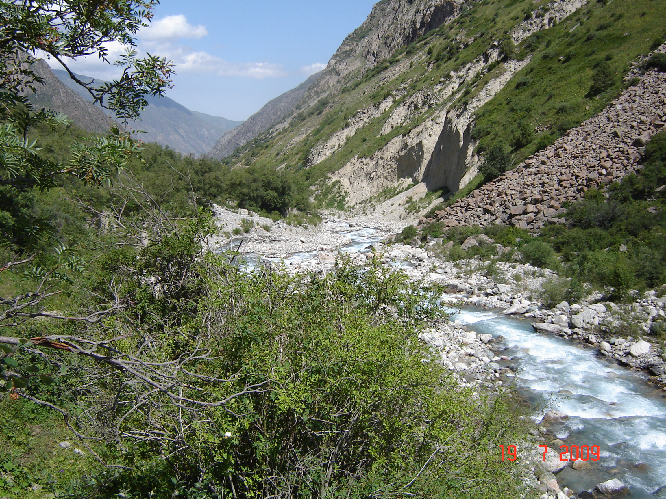 Река Сокулук перед впадением в неё притока Ашутор